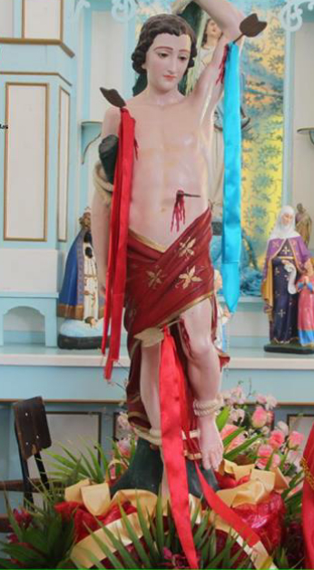 vbbbnn